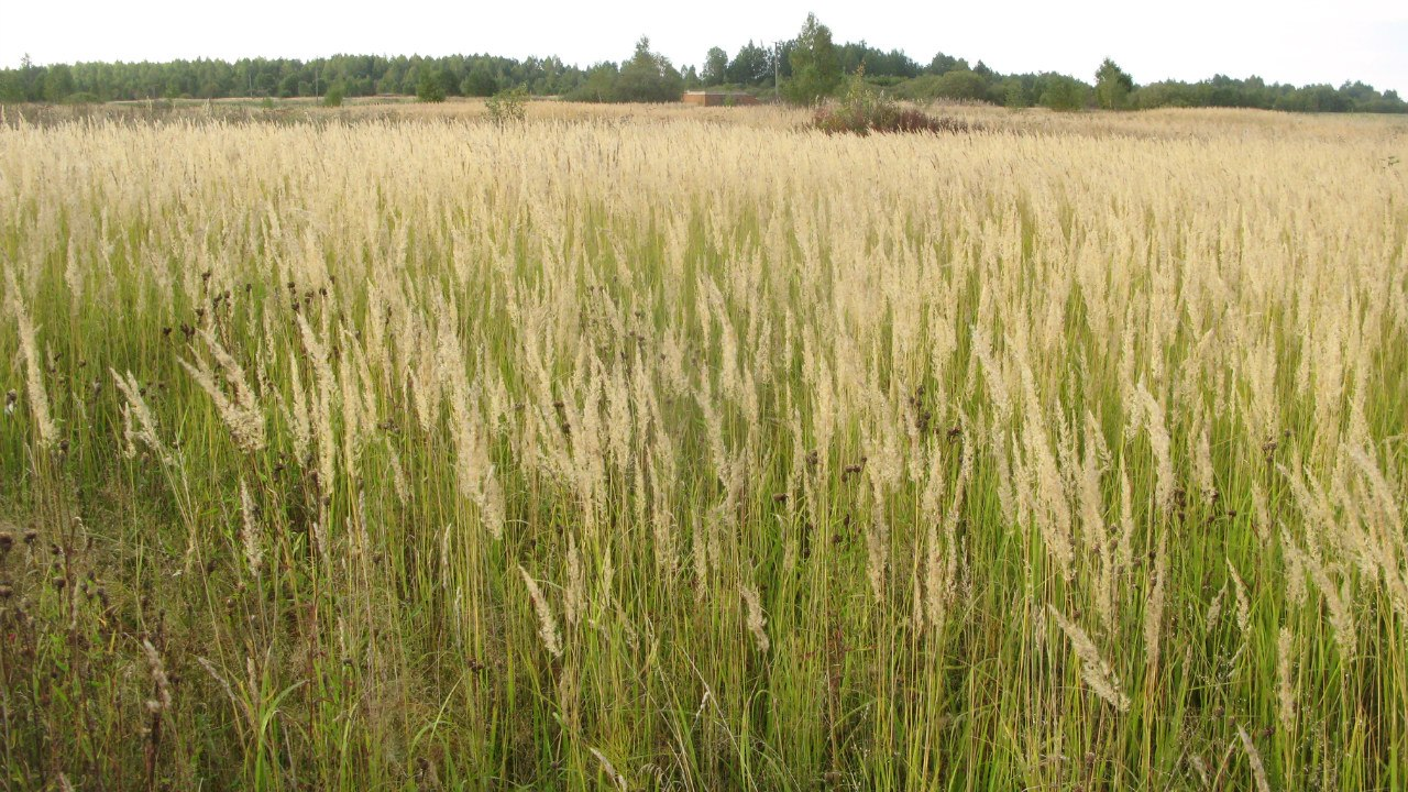 Заброшенная деревня Монино Смоленской области Глинковского района.